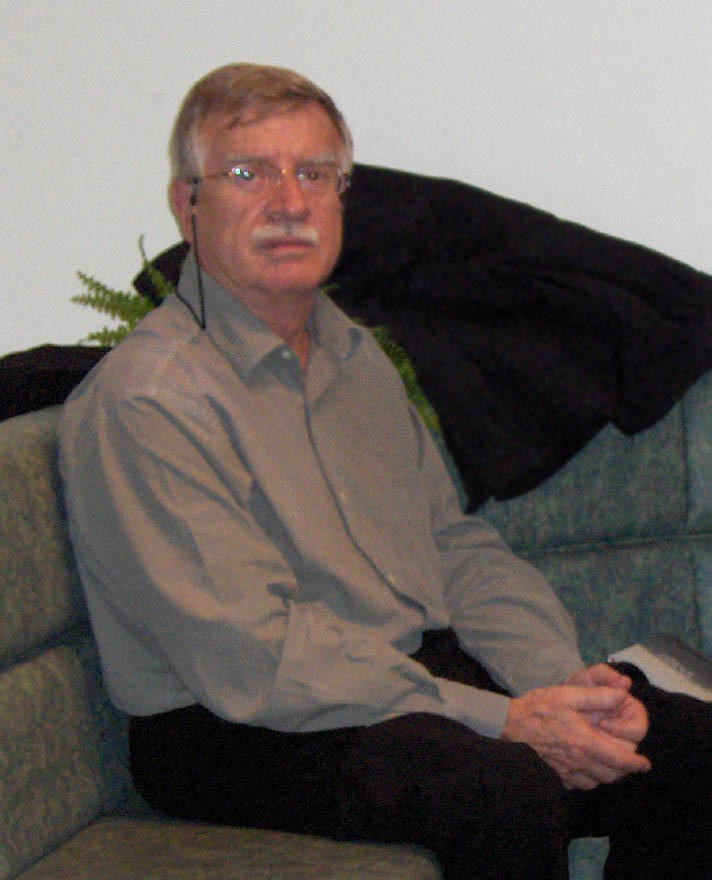 Louis Gardel au 18ème Festival international de géographie de Saint-Dié des Vosges